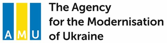 Logo von AMU